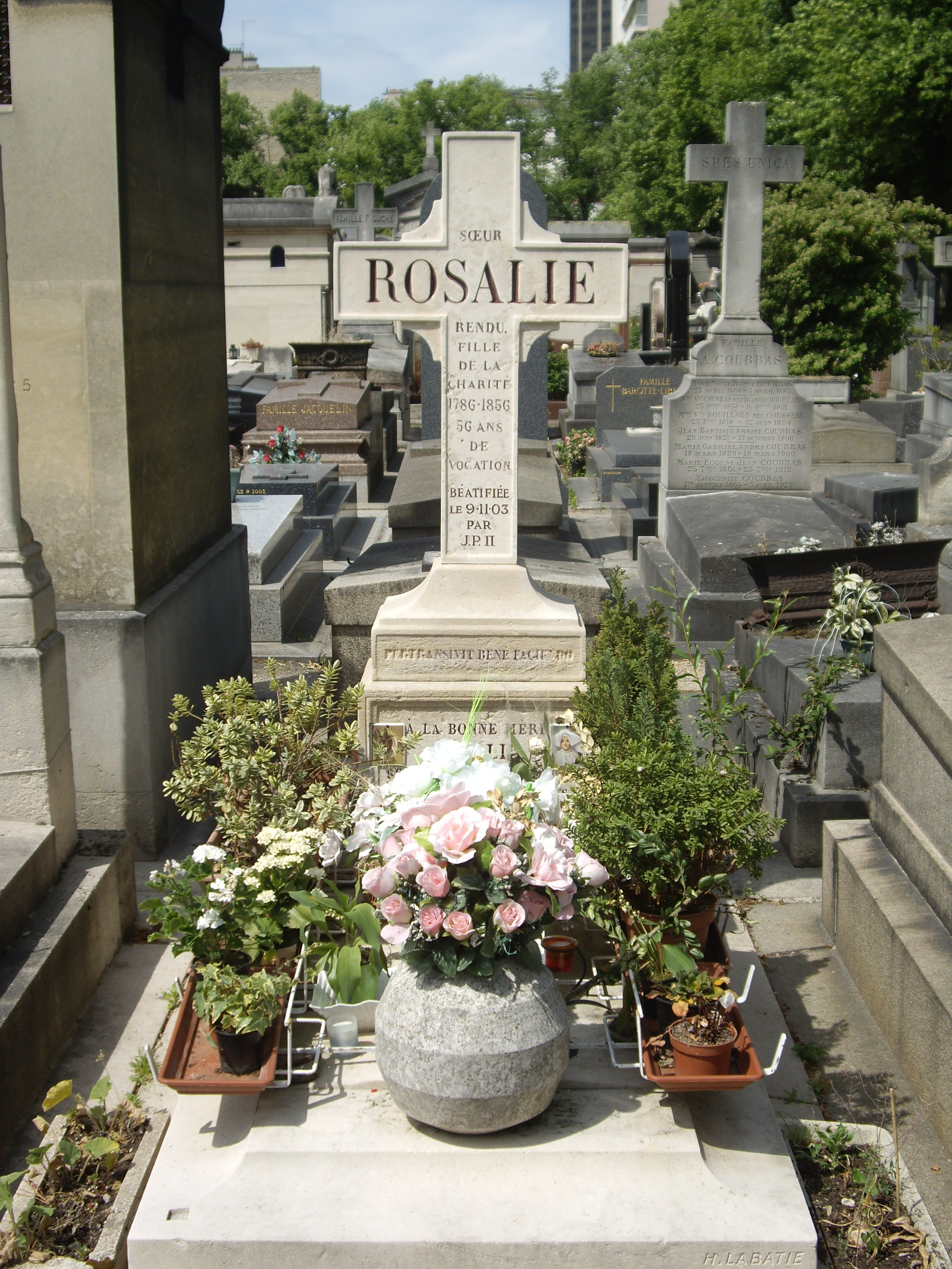 Tombe de la sœur Rosalie Rendu, cimetière du Montparnasse, division 14.